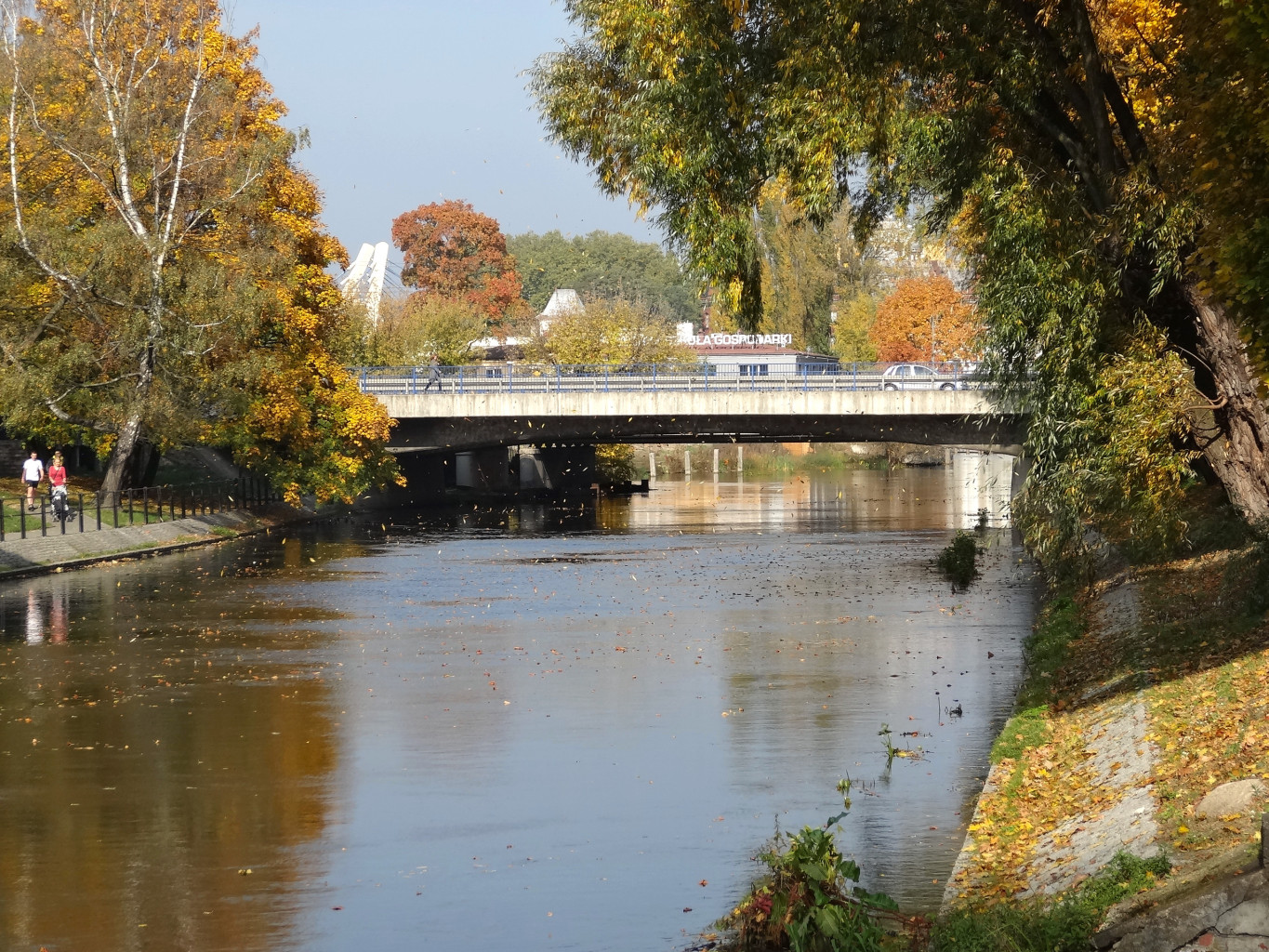 Mosty Solidarności w Bydgoszczy